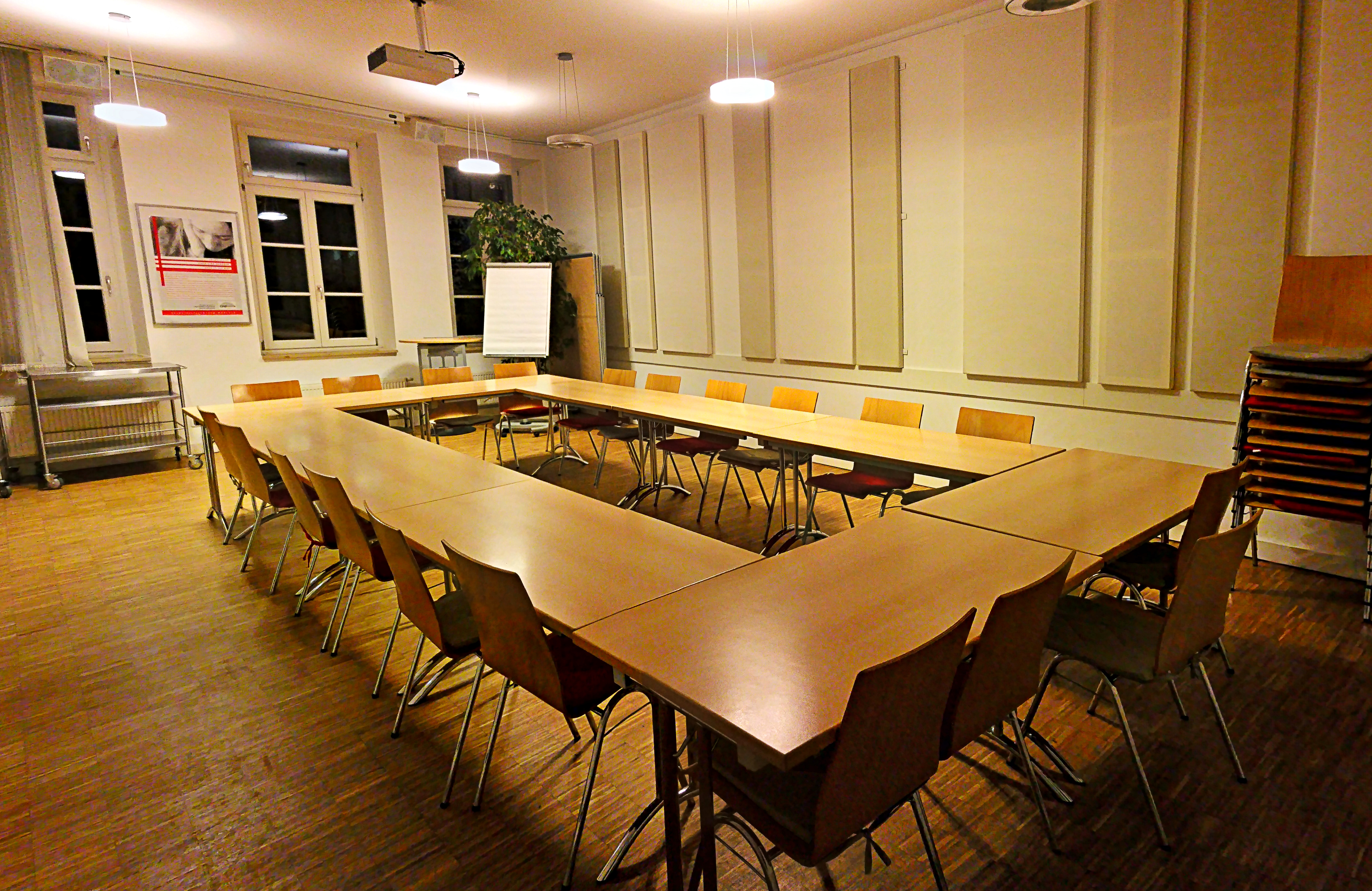 Deutschland, Bayern, München, Selbsthilfezentrum